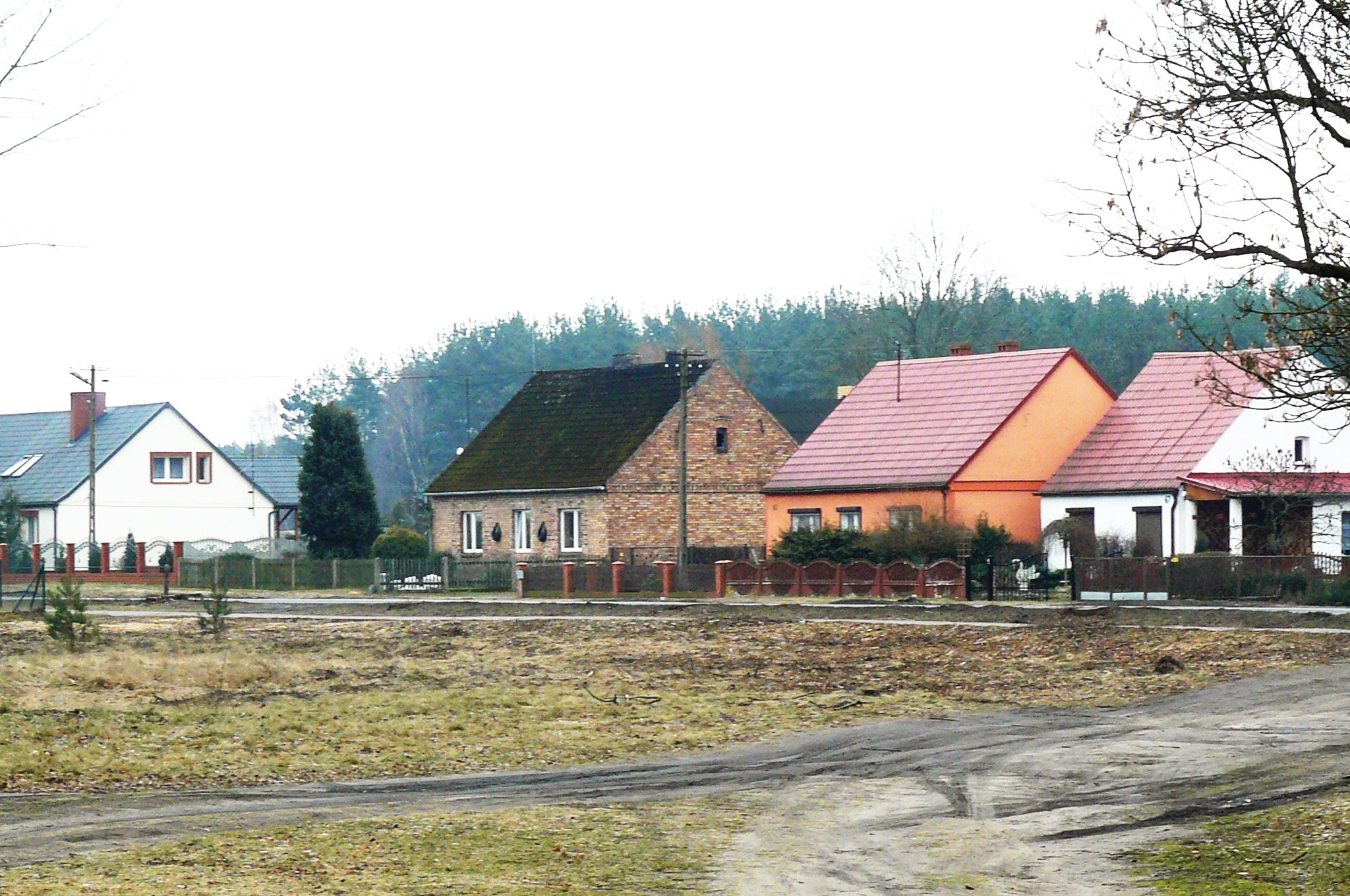 Centralny plac Piotrowa koło Obrzycka.